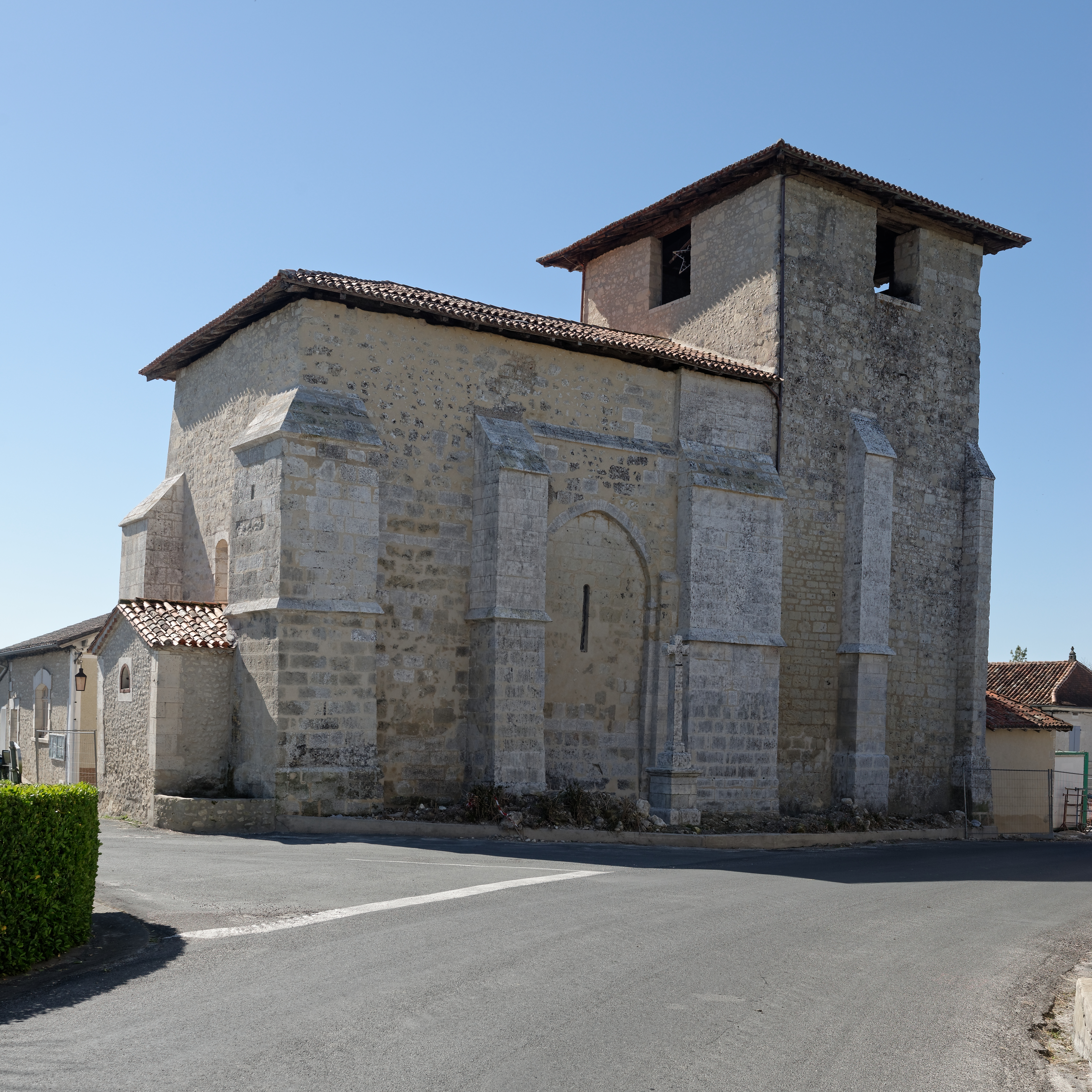 Église Saint-Eutrope de Lusignac, Dordogne, France.